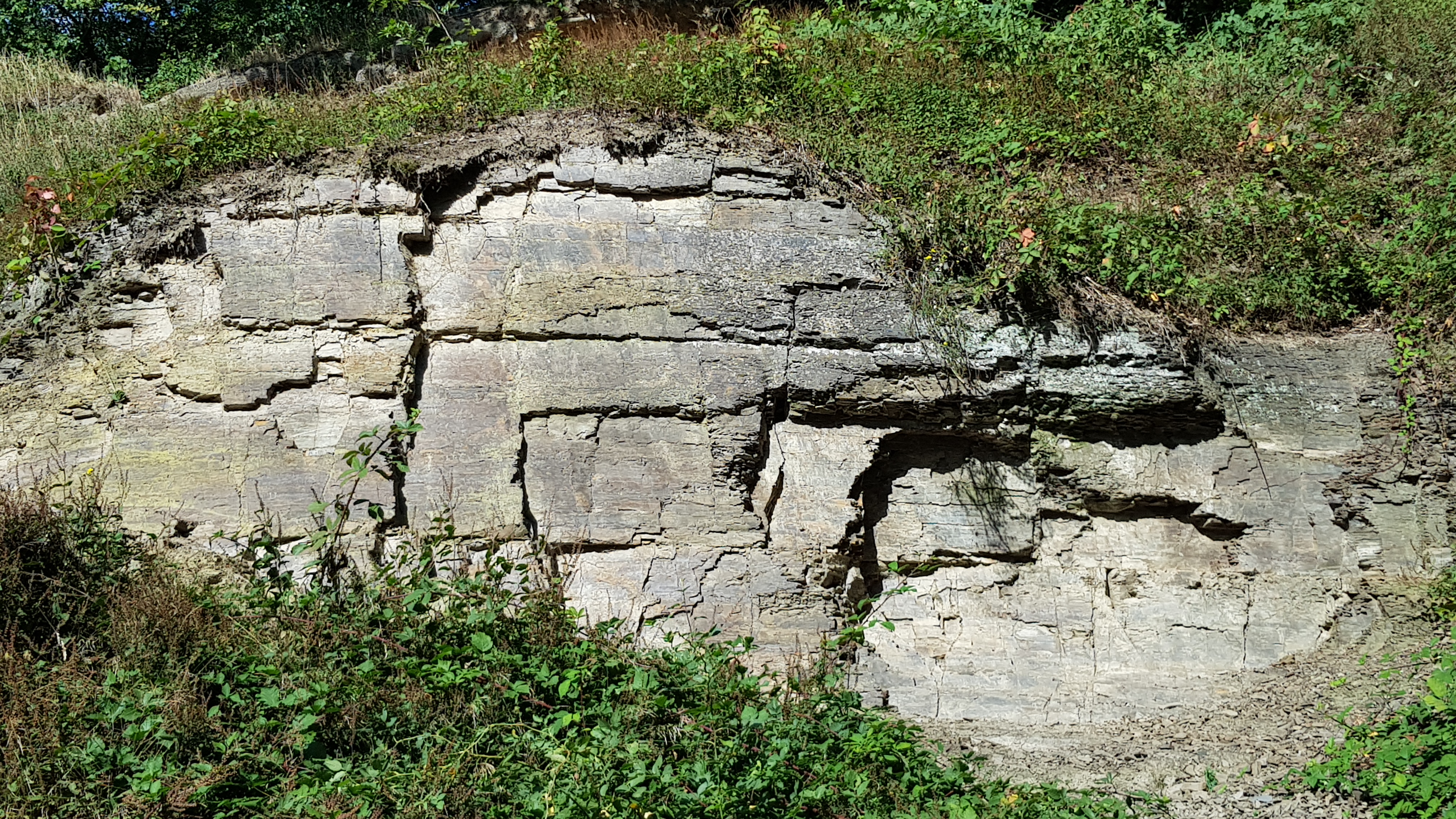 Geologisch monument Heimansgroeve, Vaals, Nederland